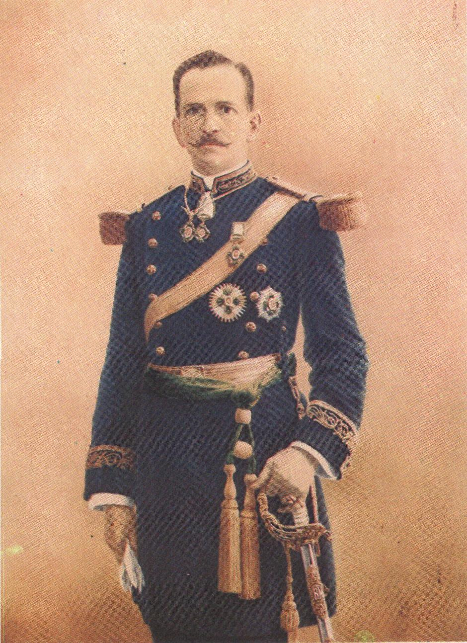 General Joaquín Beltrán Castañares